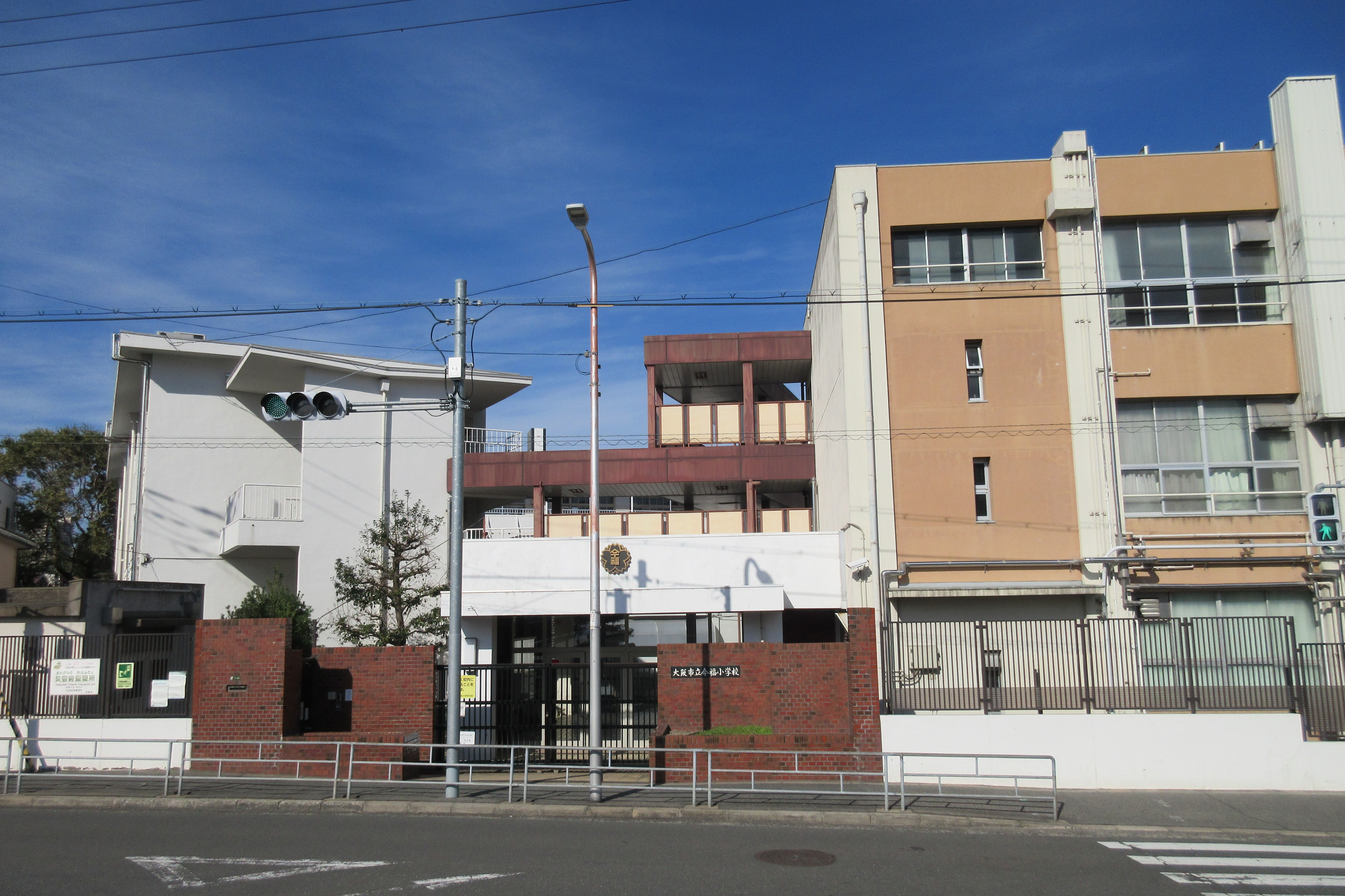 大阪市立今福小学校